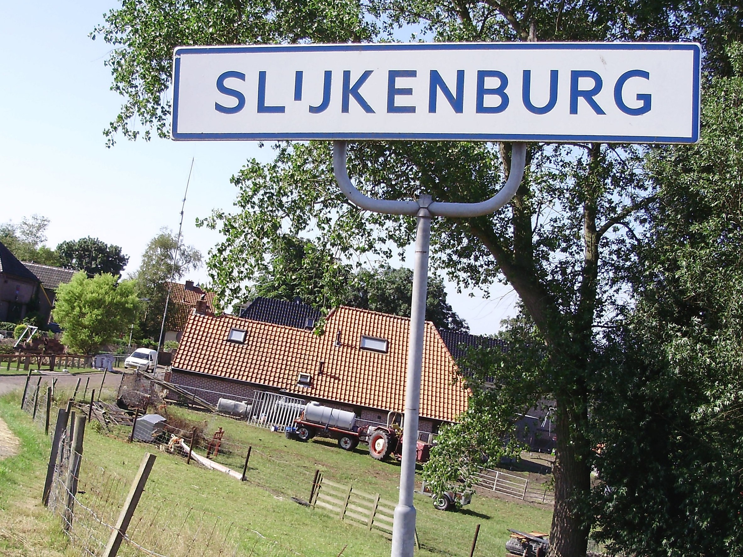 Slijkenburg in gemeente Weststellingwerf (provincie Friesland, Nederland)